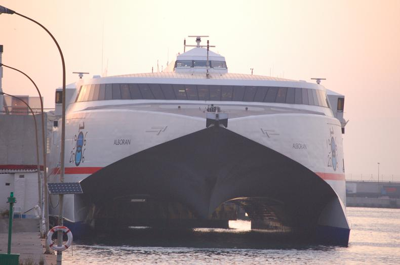 Catamaran Alborán de Acciona Trasmediterránea en el puerto de Ceuta Eslora:92 metros Velocidad : 42,5 Kms/hora